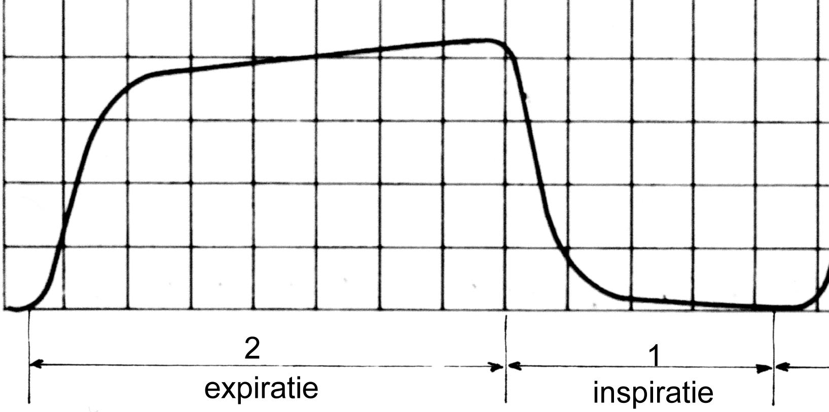 Een capnogram.